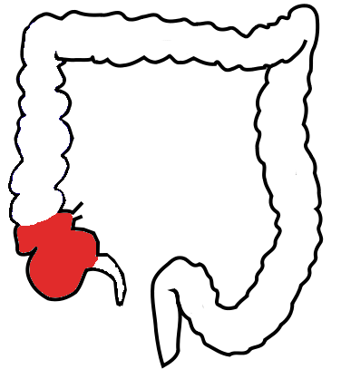 Cieco (parte dell'intestino crasso)